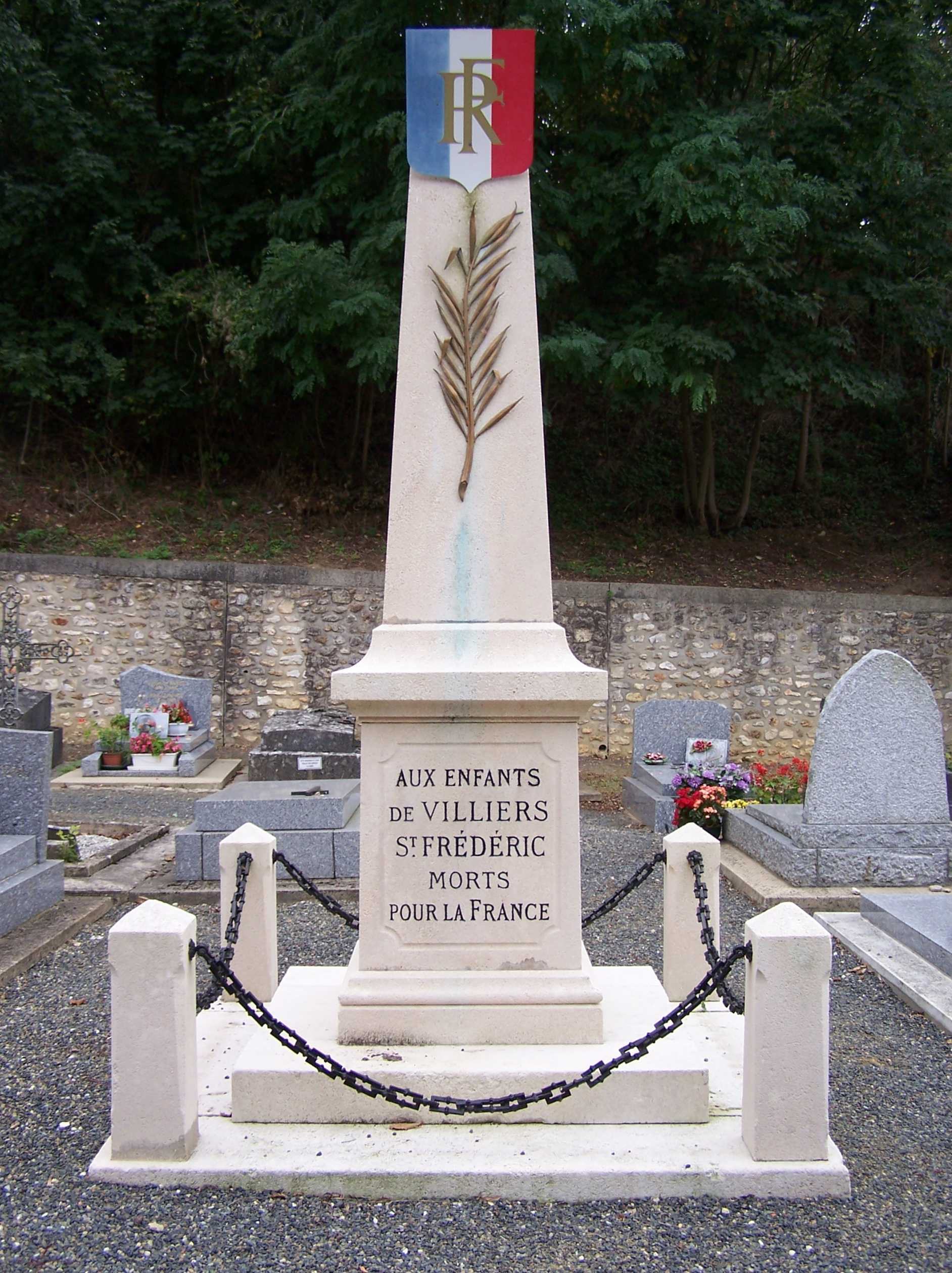 Monument aux morts de Villiers-Saint-Frédéric (Yvelines, France)